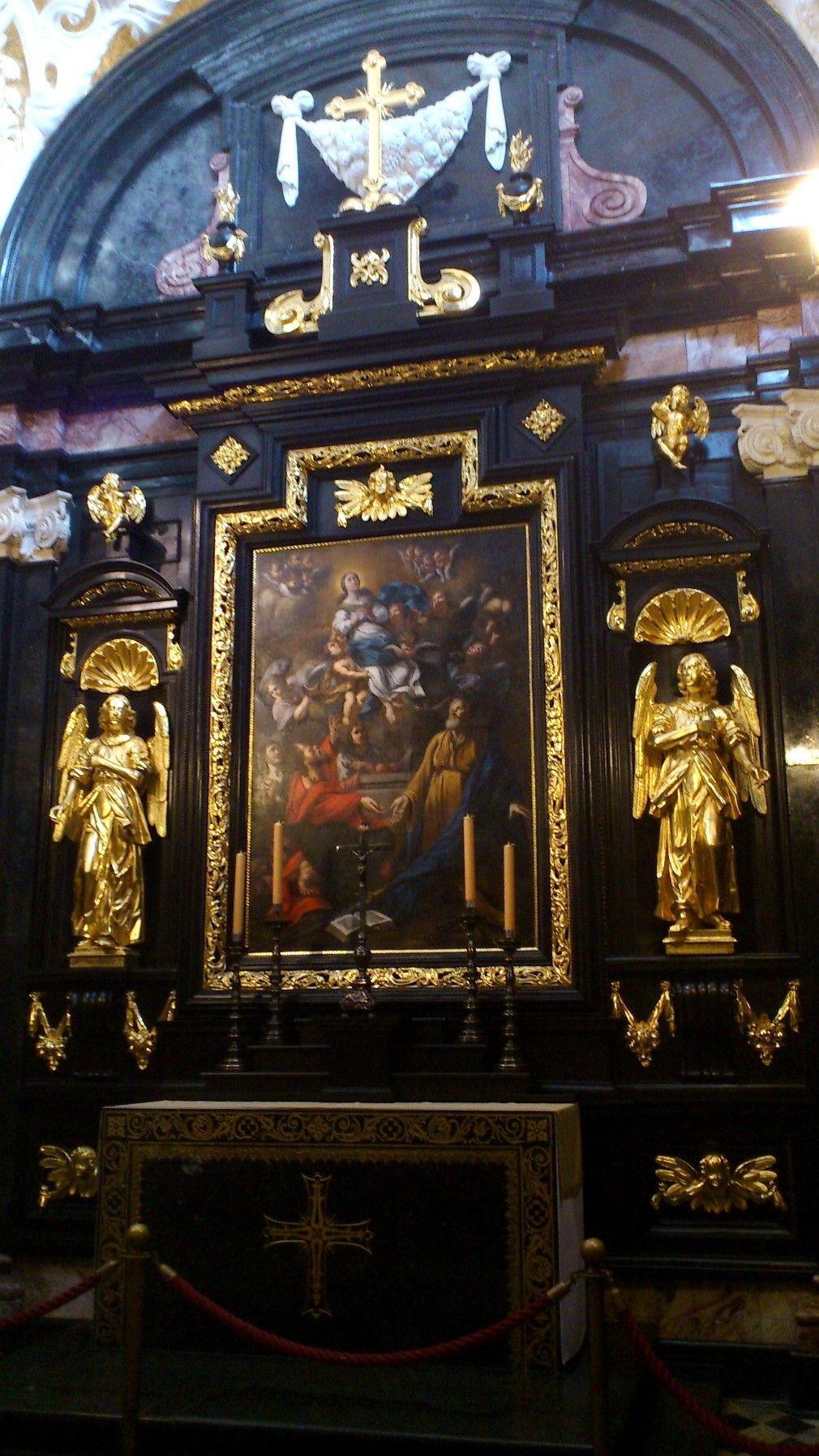 Katedra Wawelska - ołtarz w kaplicy Wazów